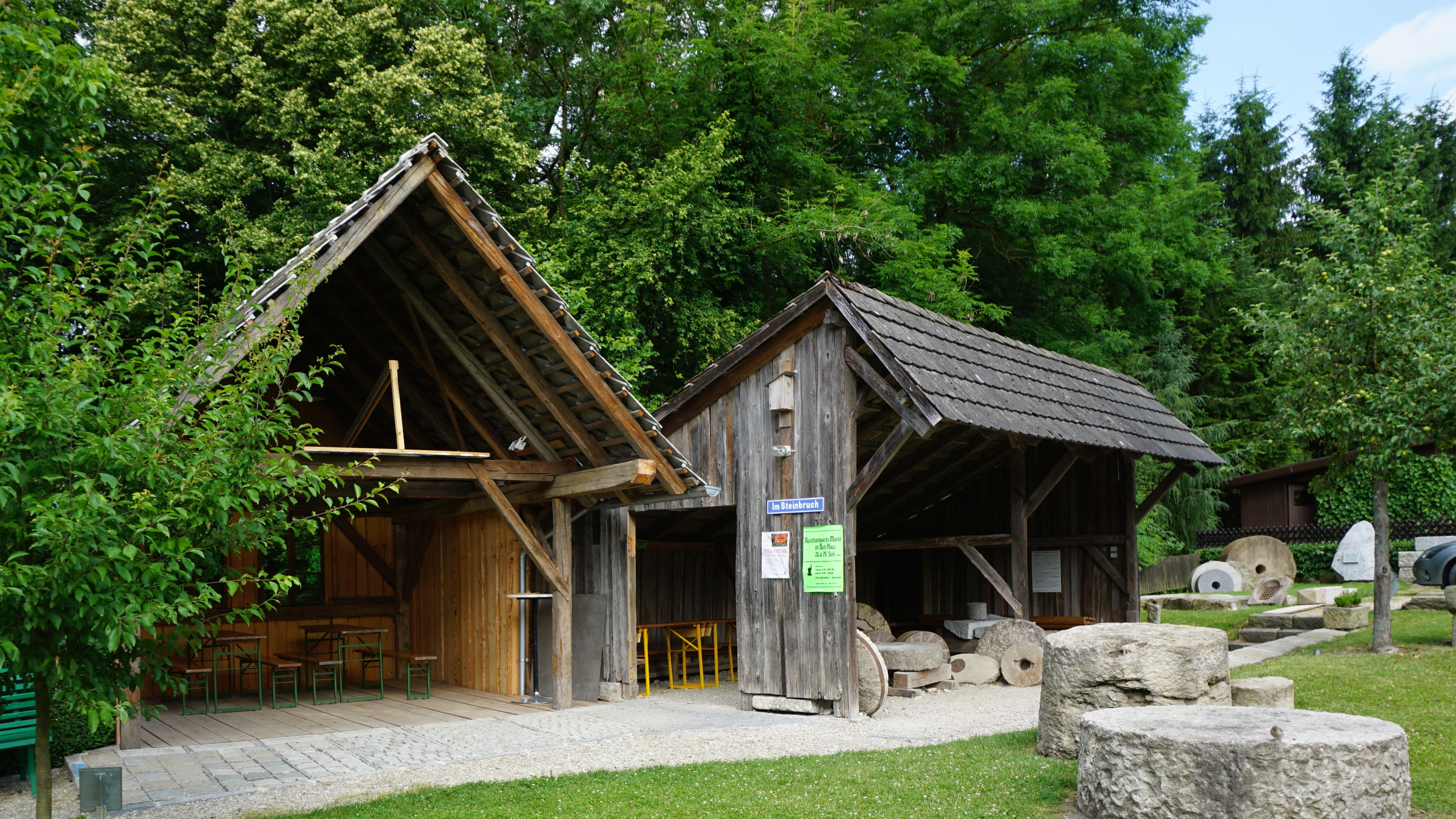 Arbeits- und Gartenhütte auf dem Areal des denkmalgeschützten Steinbrecherhauses in Perg, Oberösterreich